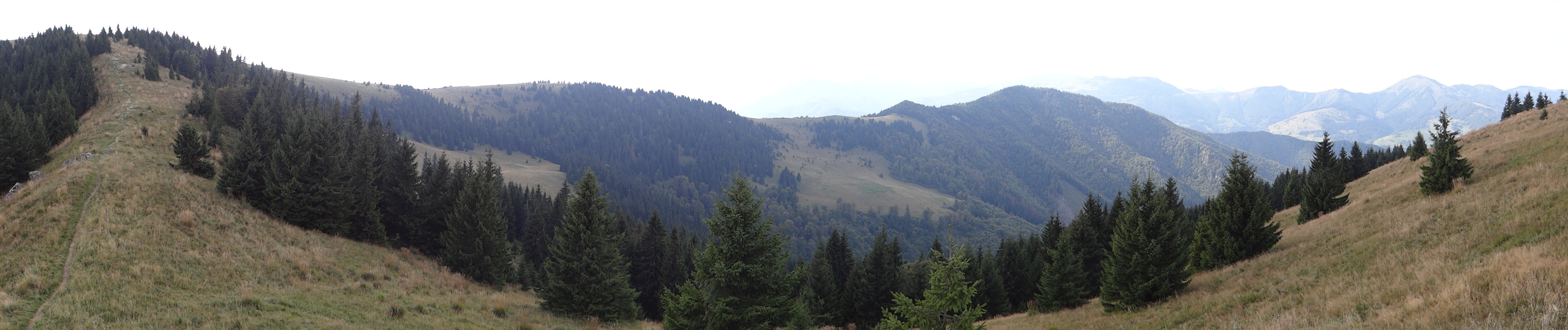 Čierný vrch, Veľký Hričkov